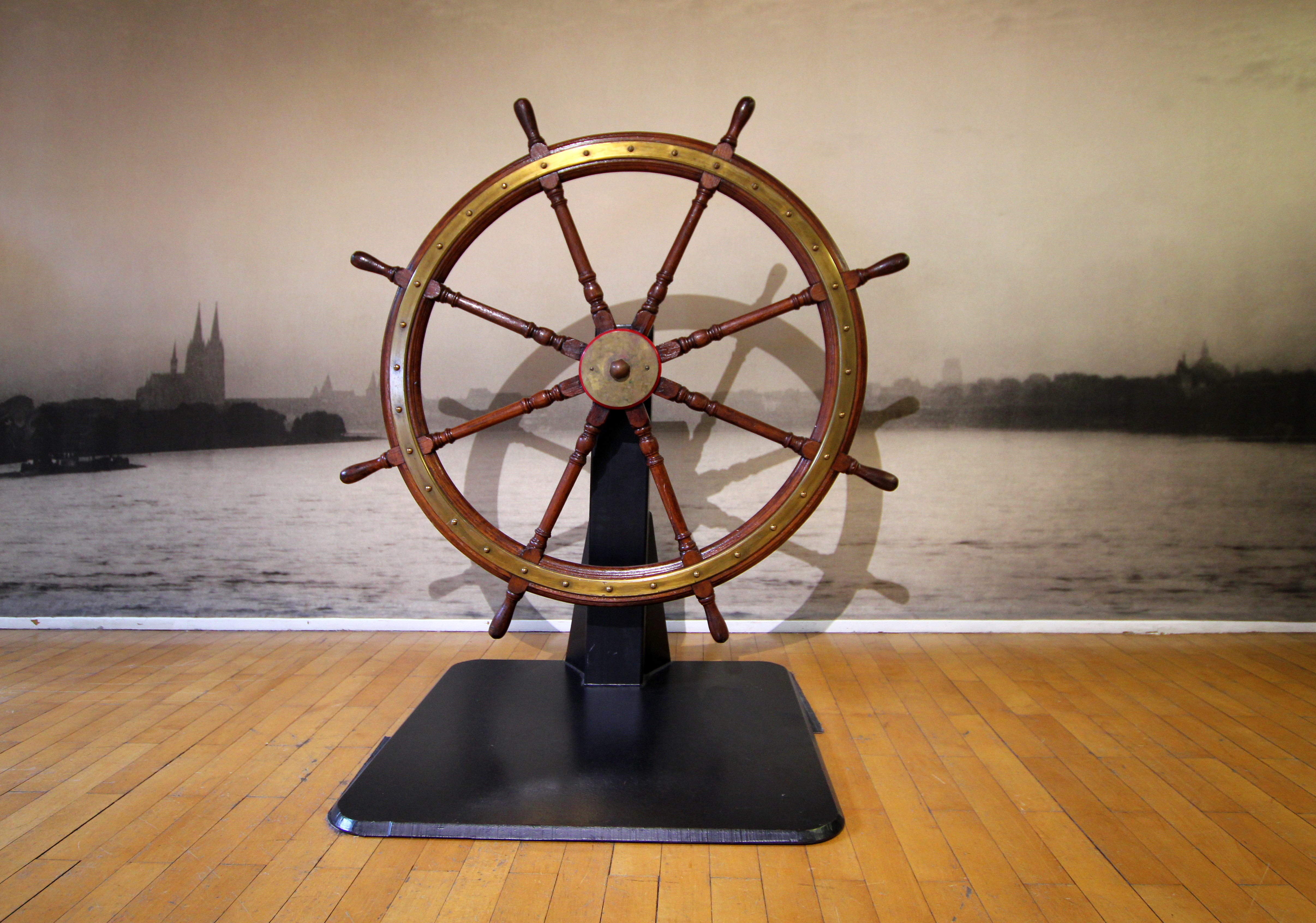 Köln, Steuerrad (Haspel) eines Dampfschiffes der "Kölnische und Düsseldorfer Gesellschaft für Rhein-Dampfschiffahrt" um 1900